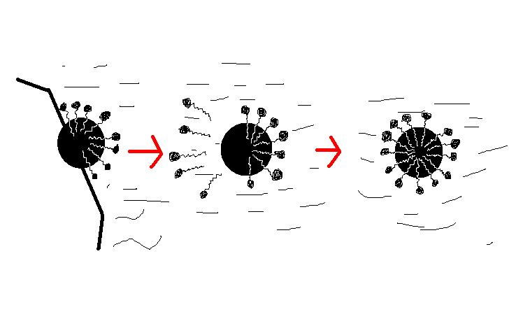 tác giả:vhm